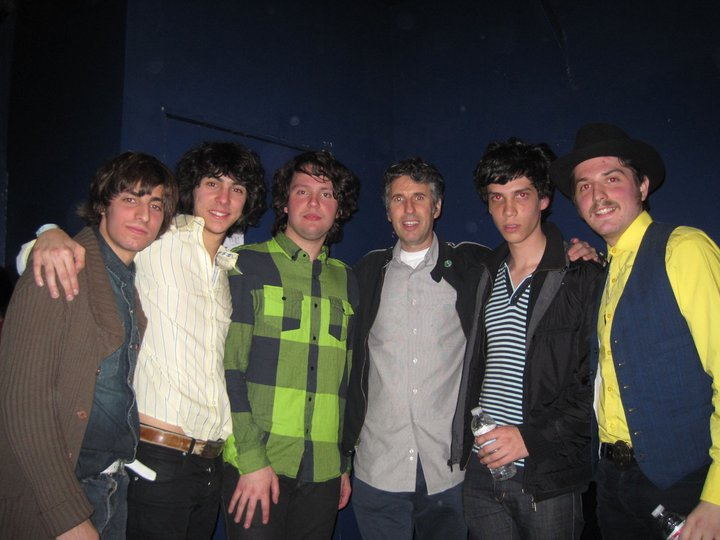 Banda de Turistas y Mario Caldato Junior en Los Angeles-California en Noviembre de 2010.